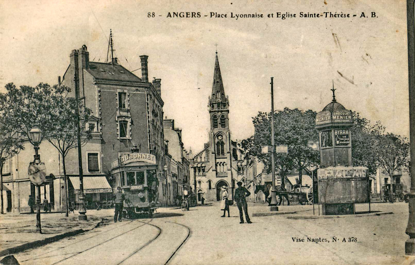 Carte postale ancienne éditée par AB, n°88 :ANGERS - Place Lyonnaise et église Sainte-Thérèse.Mention de censure "Visé Nantes n°A378"